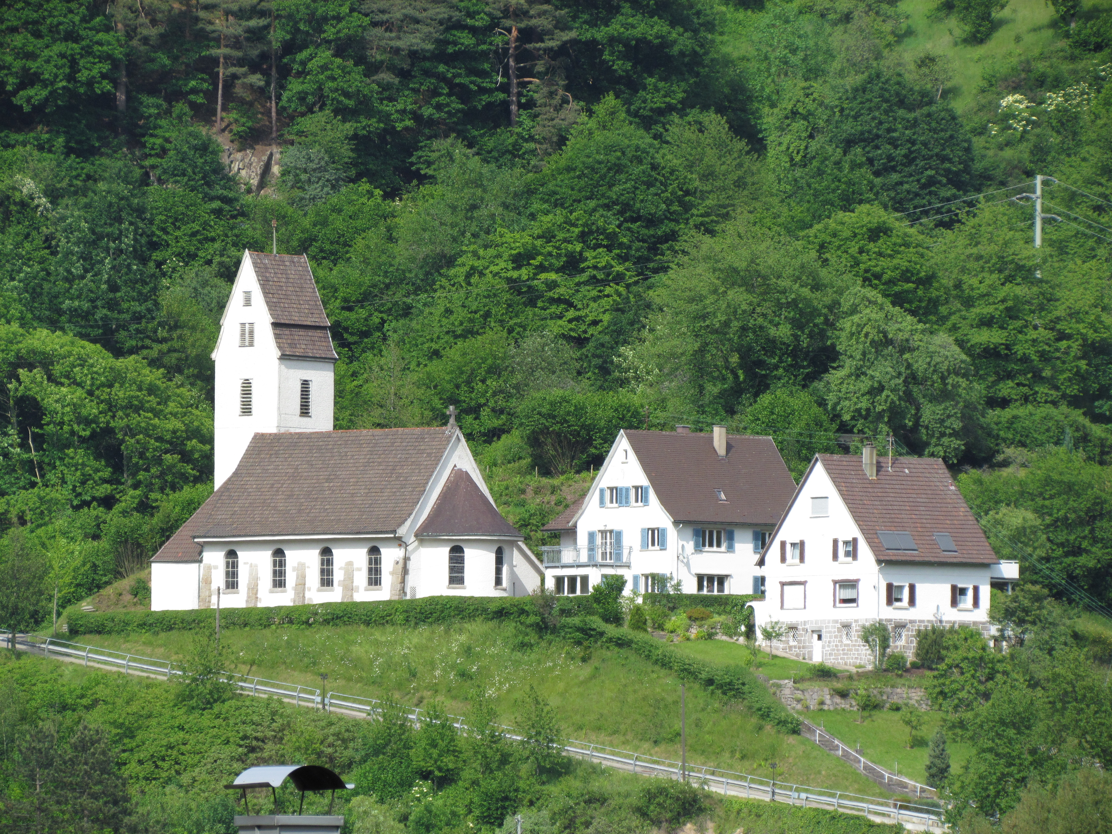 Bildinhalt: Die Evangelische Kirche mit Nebengebäuden in der Schifferstraße, vom Ausgleichsbecken aus gesehen Aufnahmeort: Forbach (Baden), Deutschland